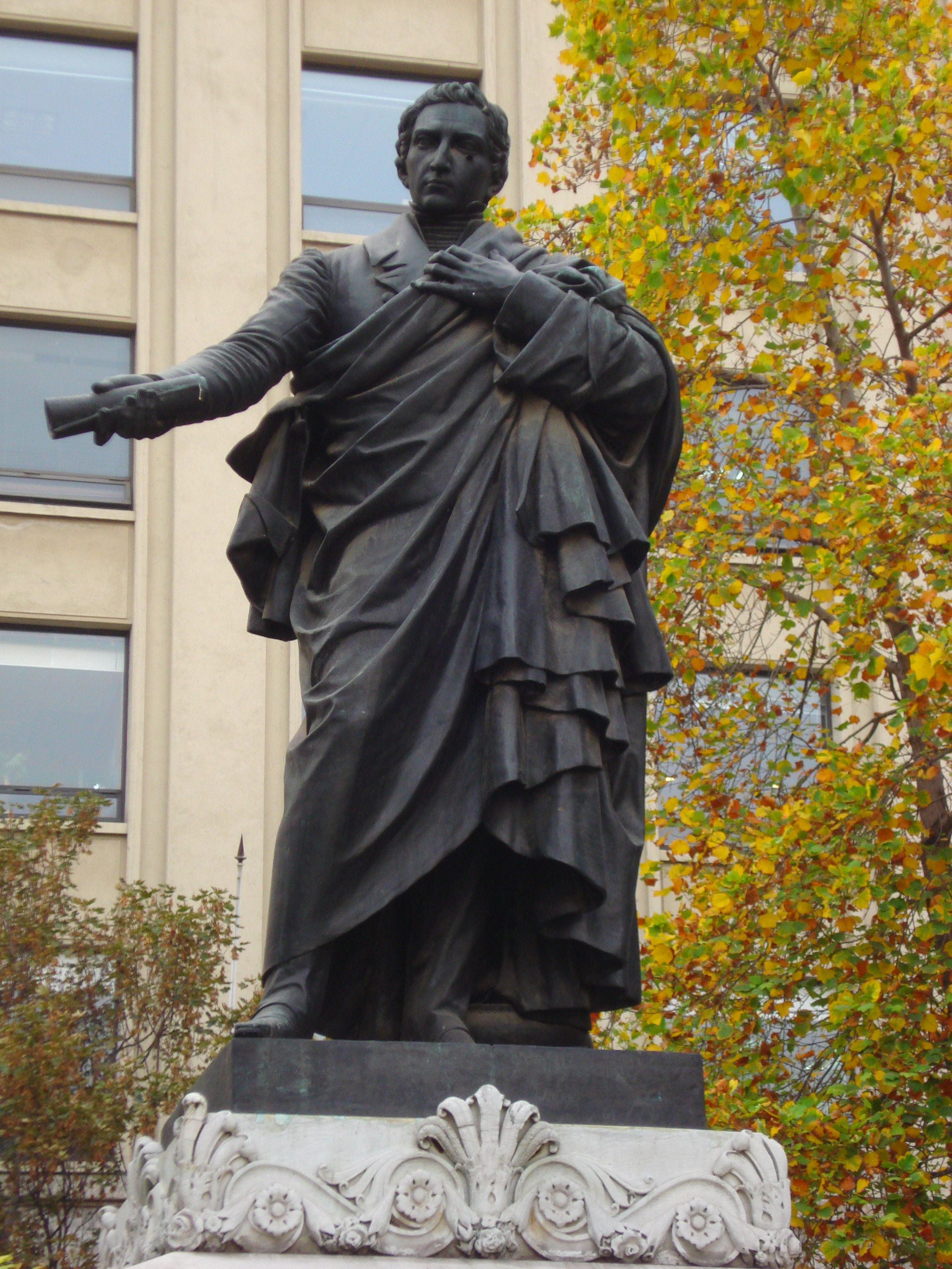 Estatua en memoria de Diego Portales en la Plaza de la Constitución, frente al Palacio de la Moneda